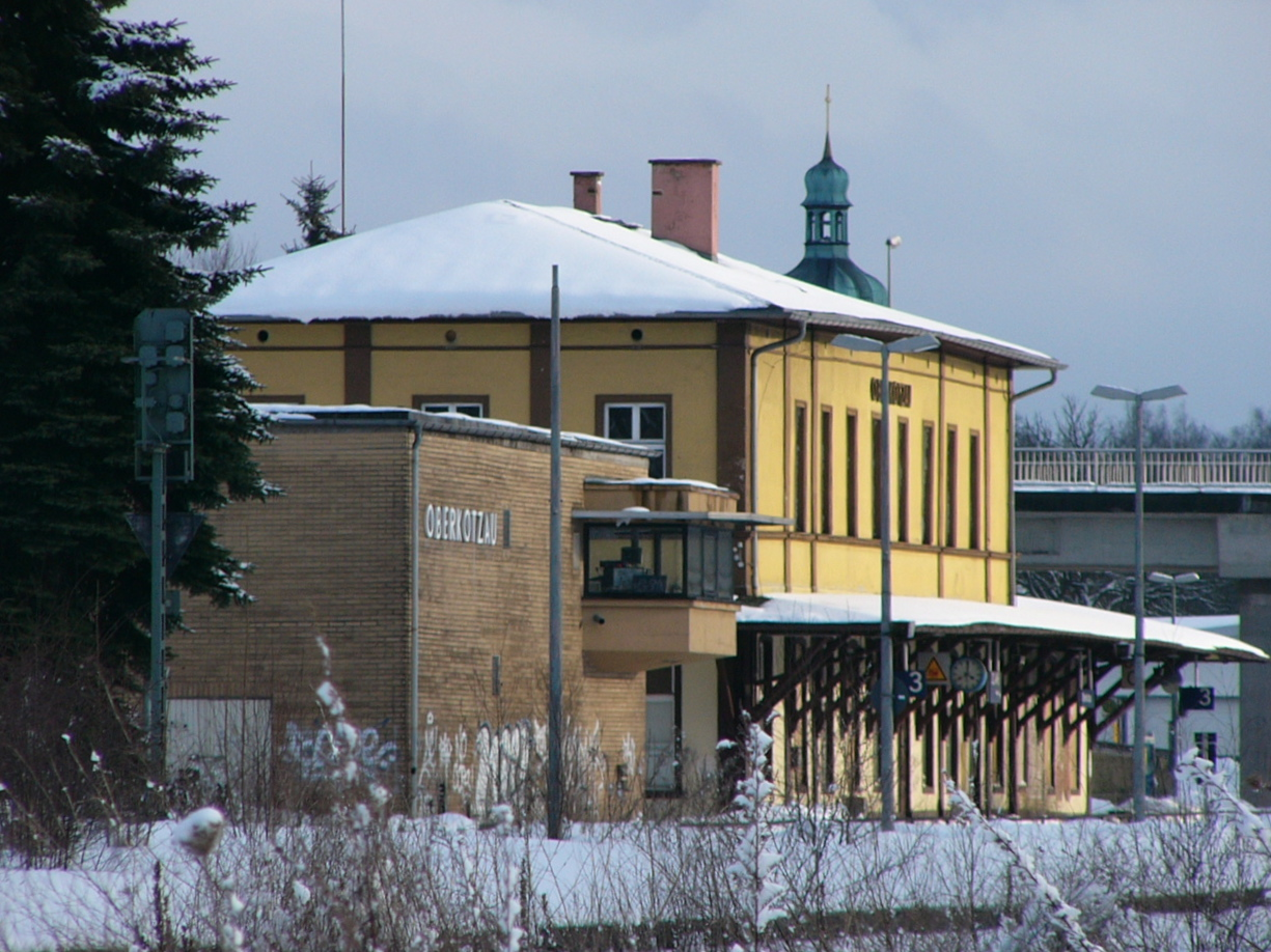 Bahnhof Oberkotzau